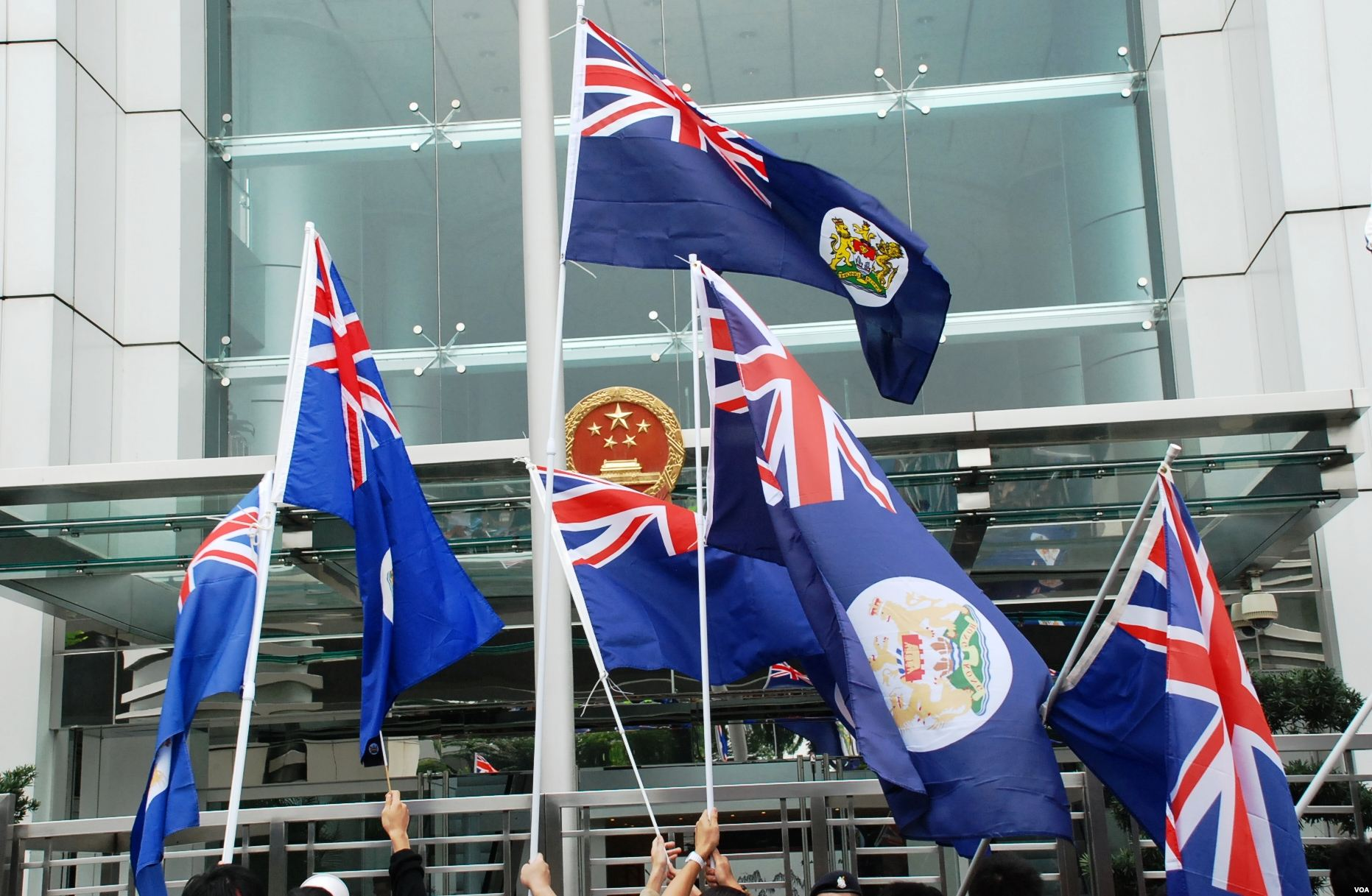 數十名示威者在中聯辦門外揮舞港英旗幟